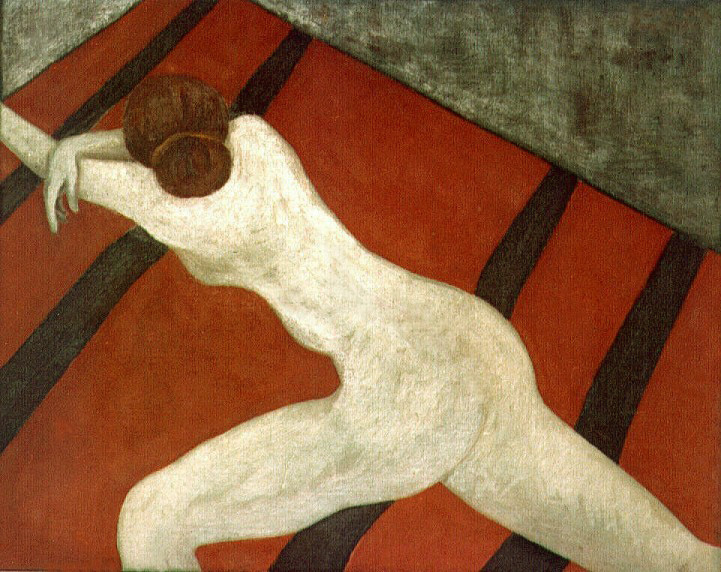 אישה ניו יורקית